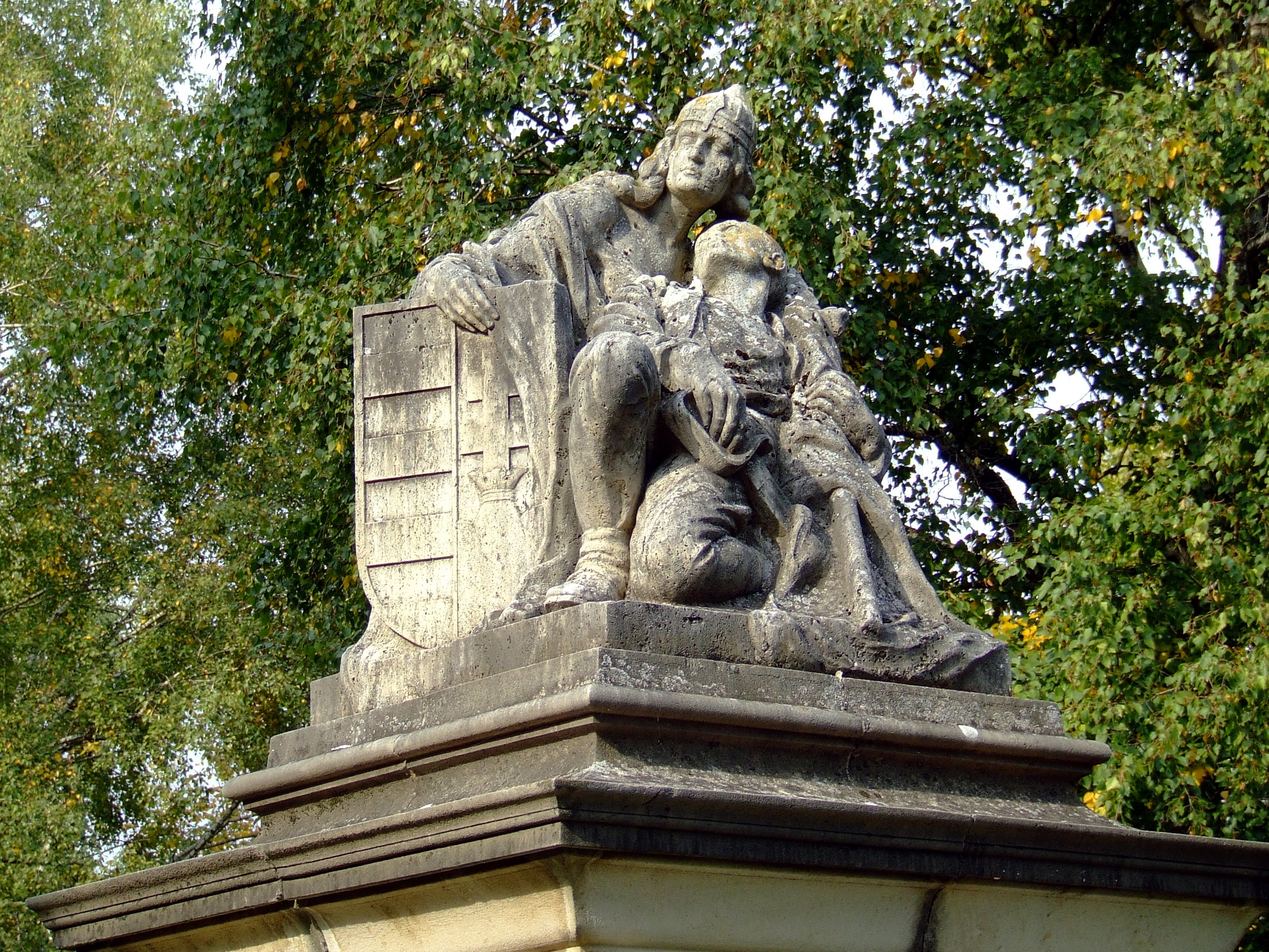 Első világháborús emlékmű Kecelen (részlet)